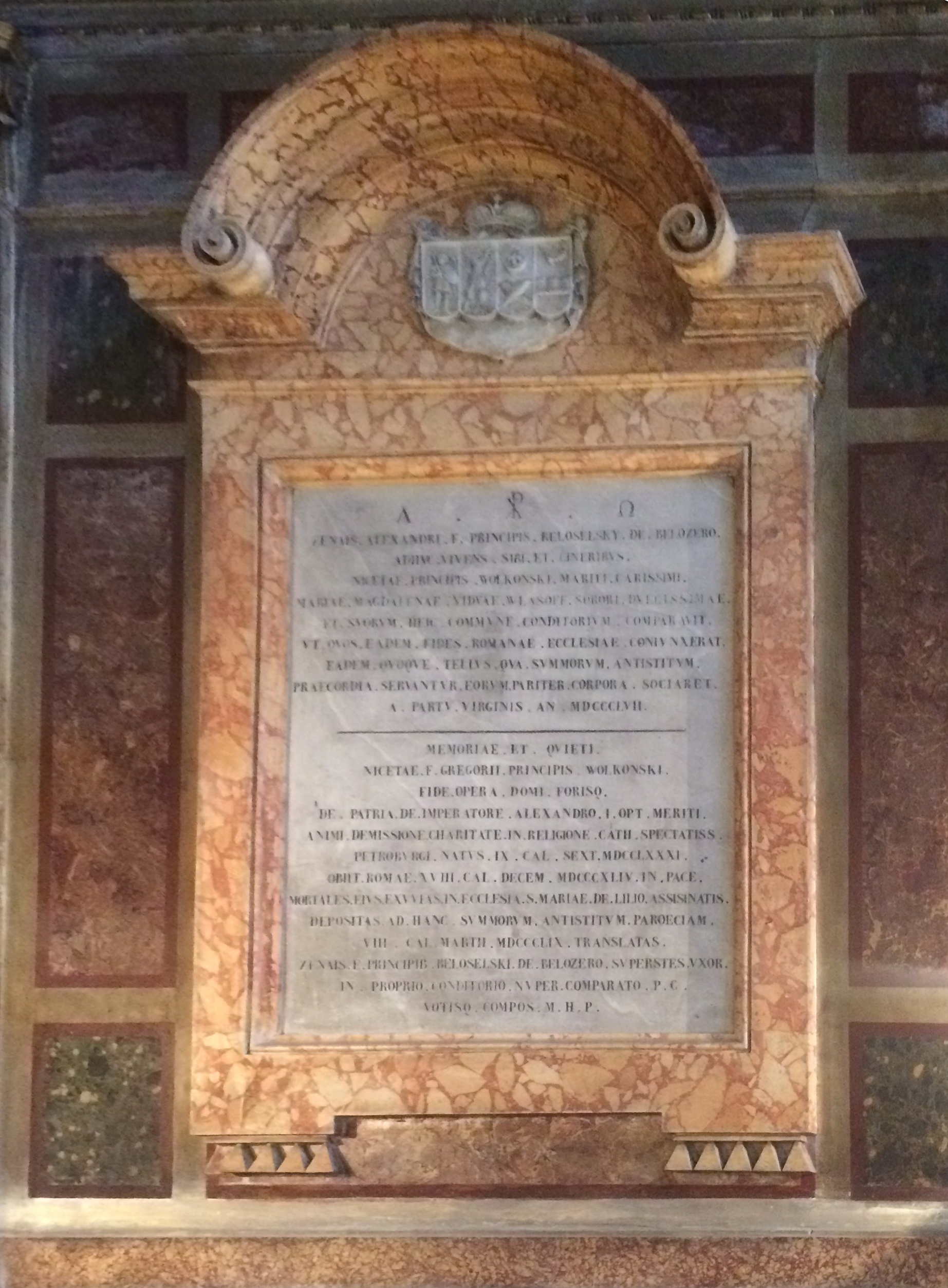 Надгробие Зинаиды Волконской